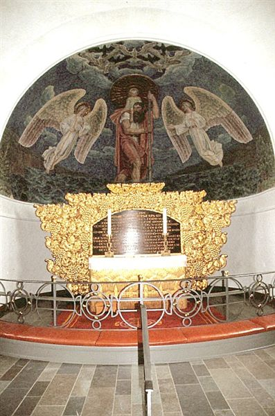 Vodskov Kirke i Danmark. Alter og apsisudsmykning